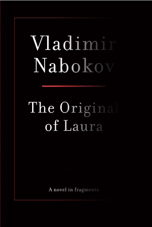 Обложка первого издания «Лаура и её оригинал» (англ. The Original of Laura) Владимира Набокова.